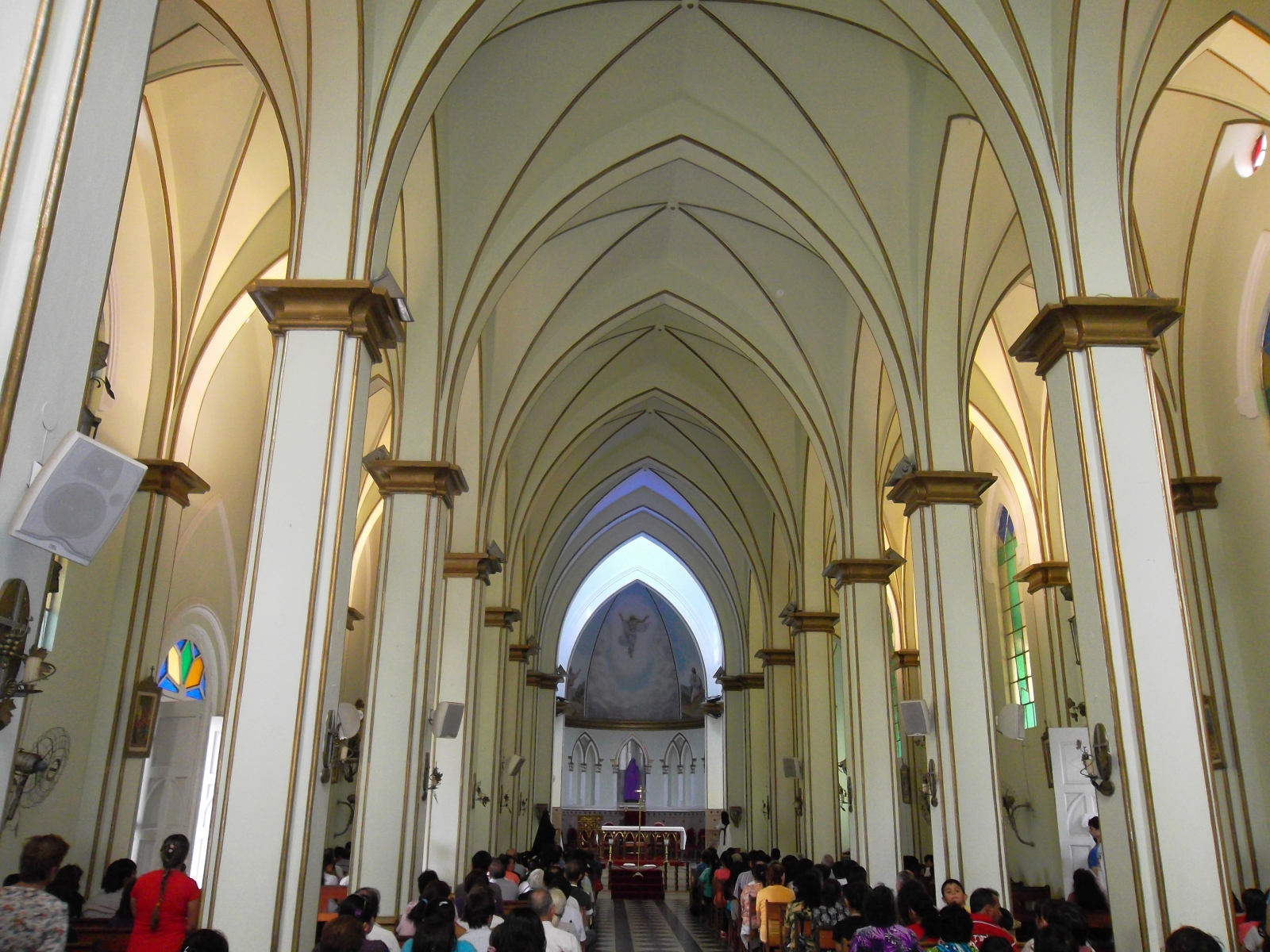 Interior de la catedral durante la celebración de la Semana Santa 2012